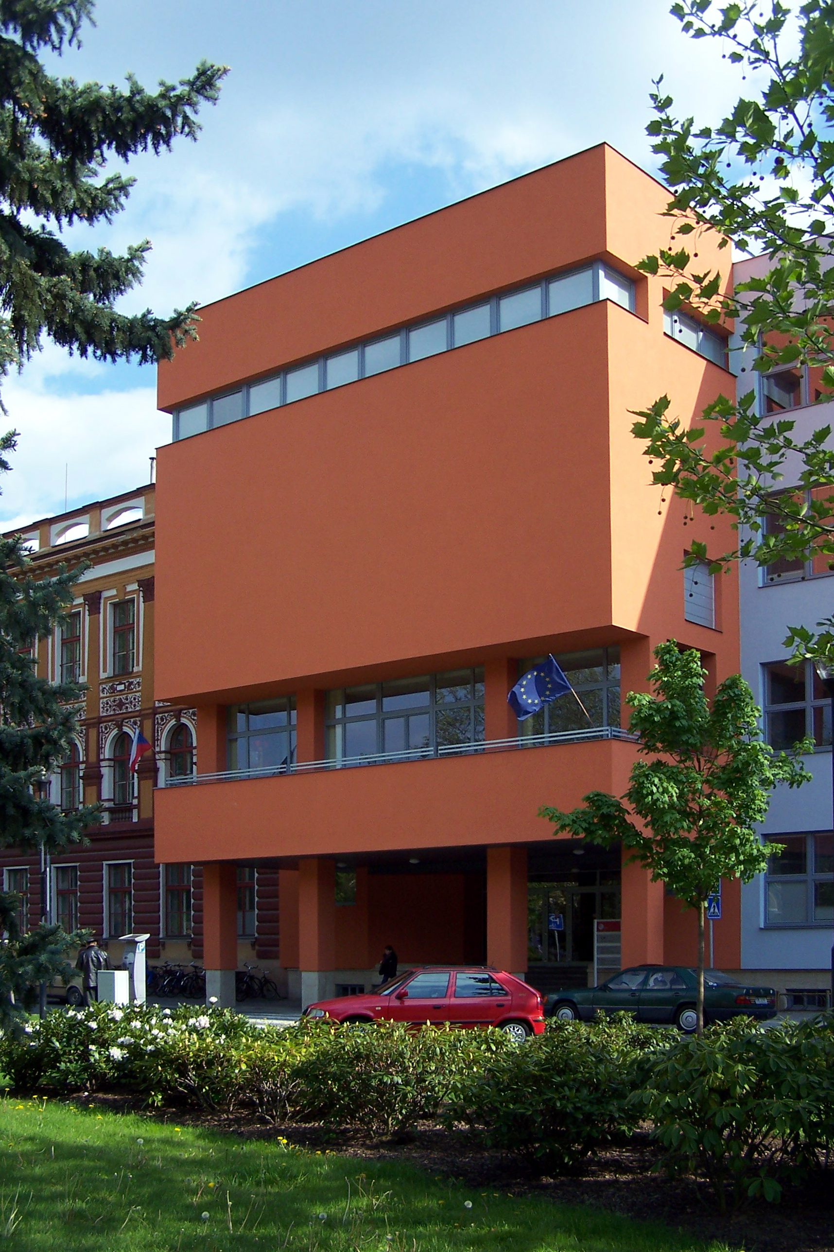 Univerzita Pardubice – budova na na. čs. Legii